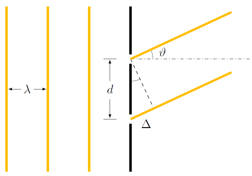 Disegno esplicativo dell'esperimento di Young per l'interferenza